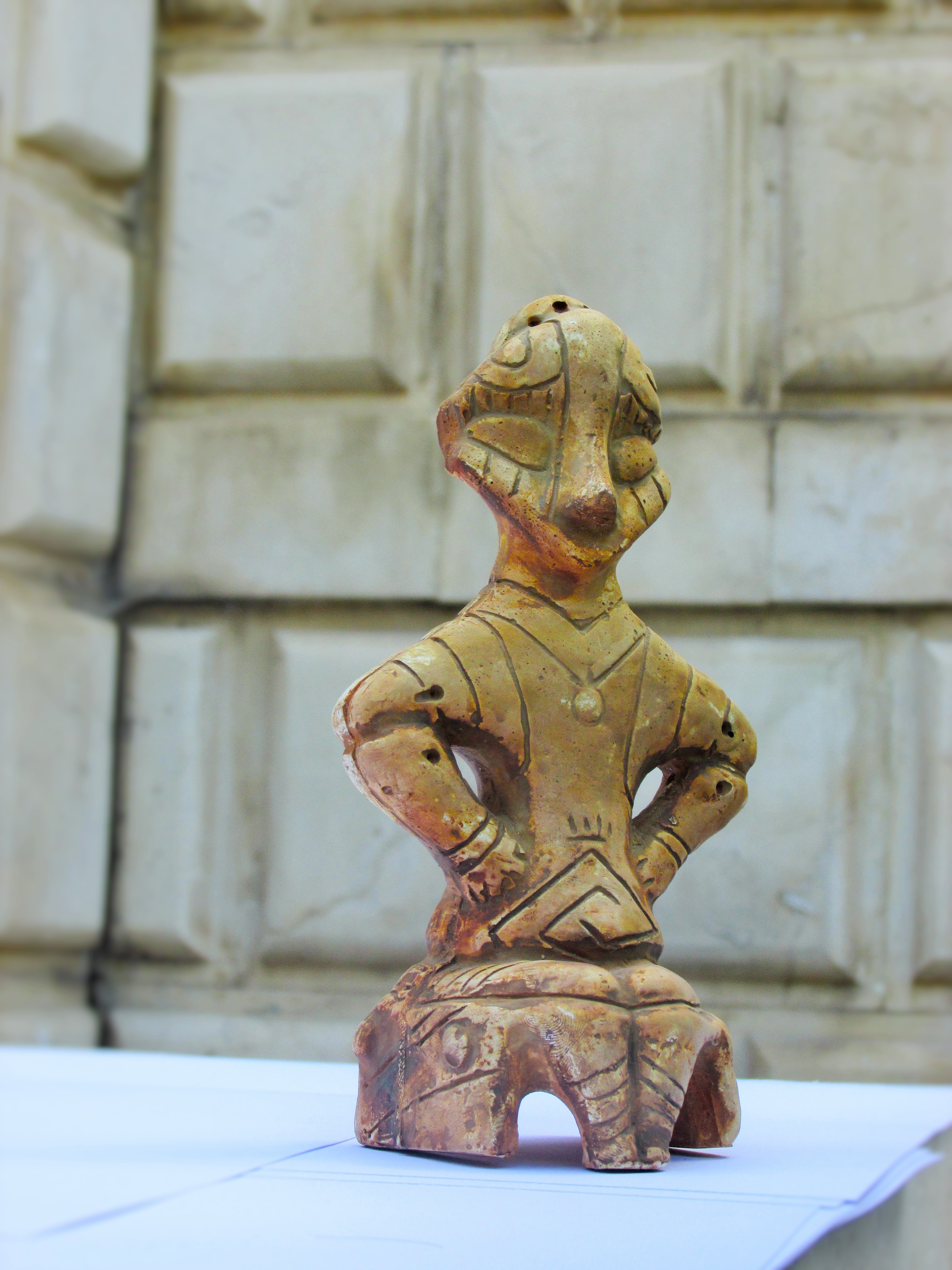 Muzeu i Kosovës